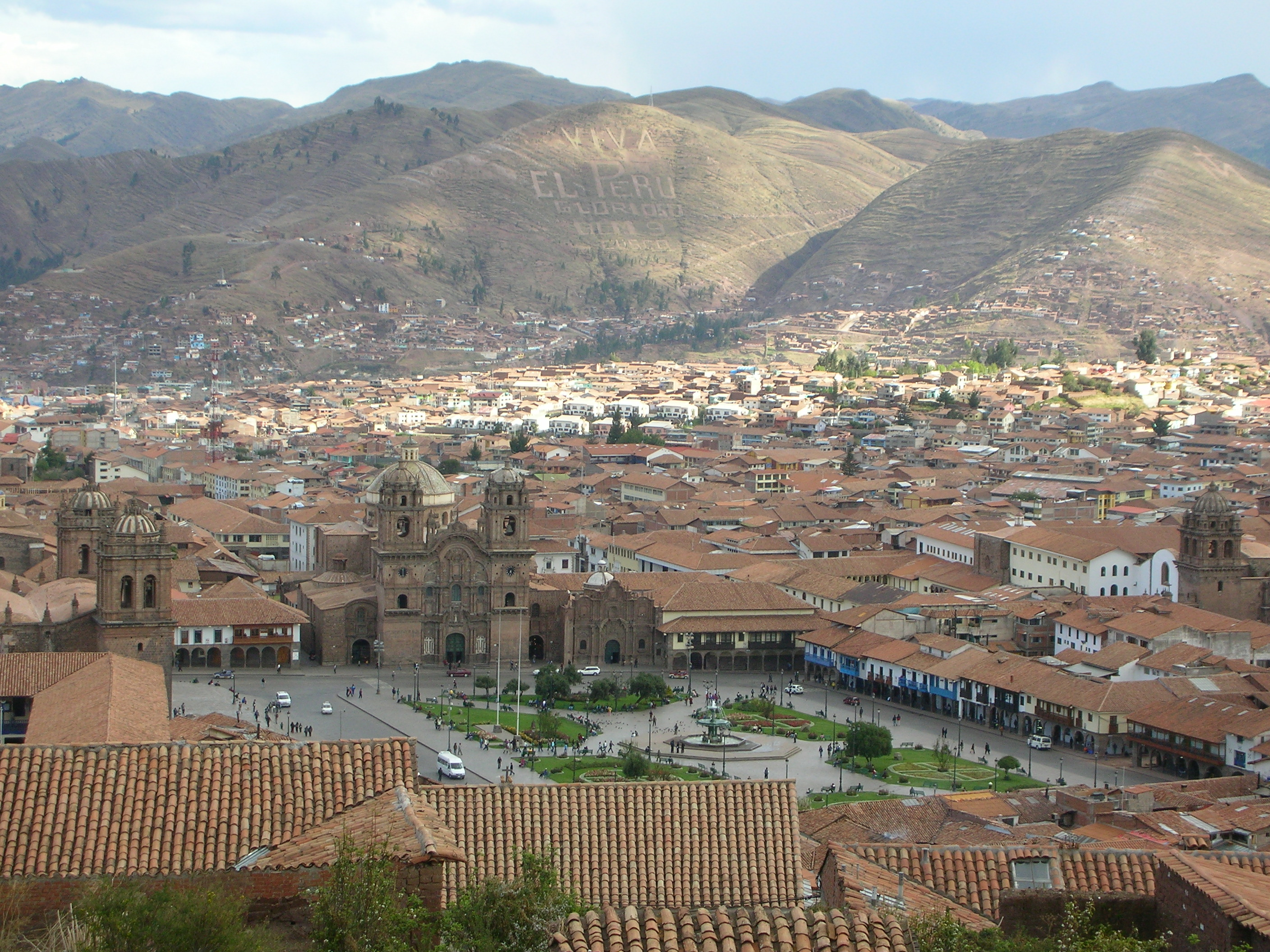 Vue de Cuzco (Pérou), prise à l'automne 2007.